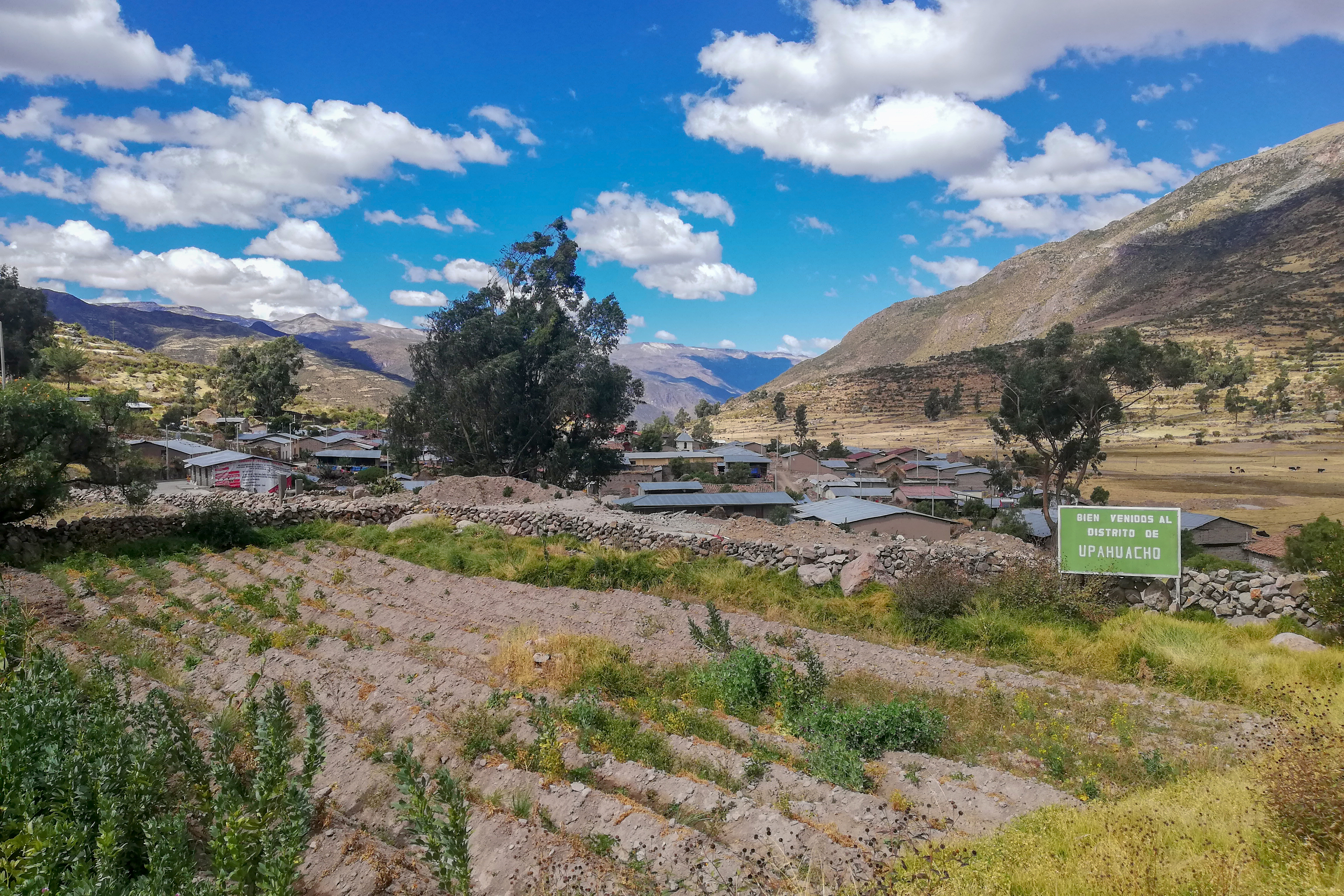 Distrito de Upahuacho entrada a sus calles